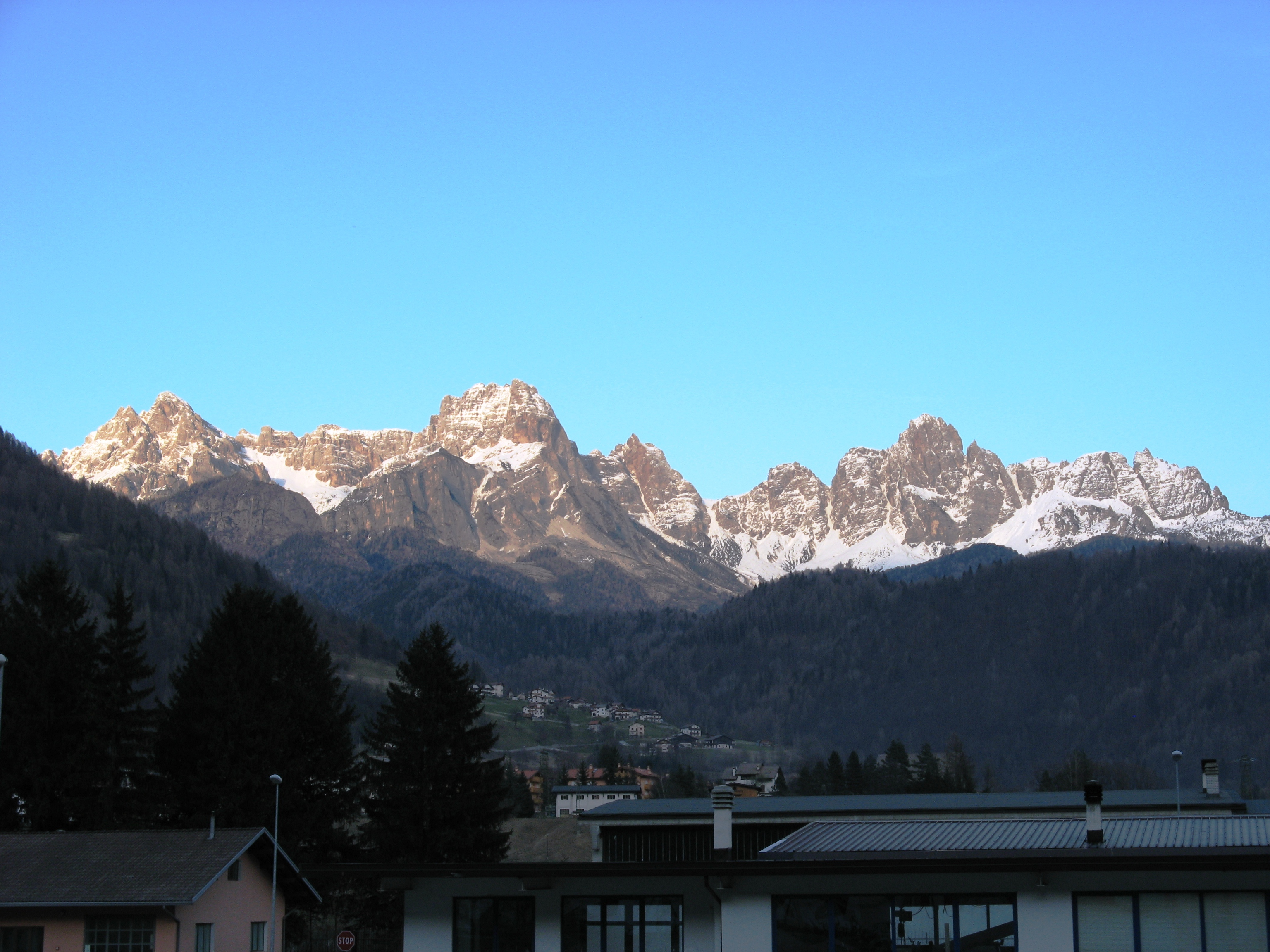 La Catena di San Sebastiano vista da Agordo, località Valcozzena